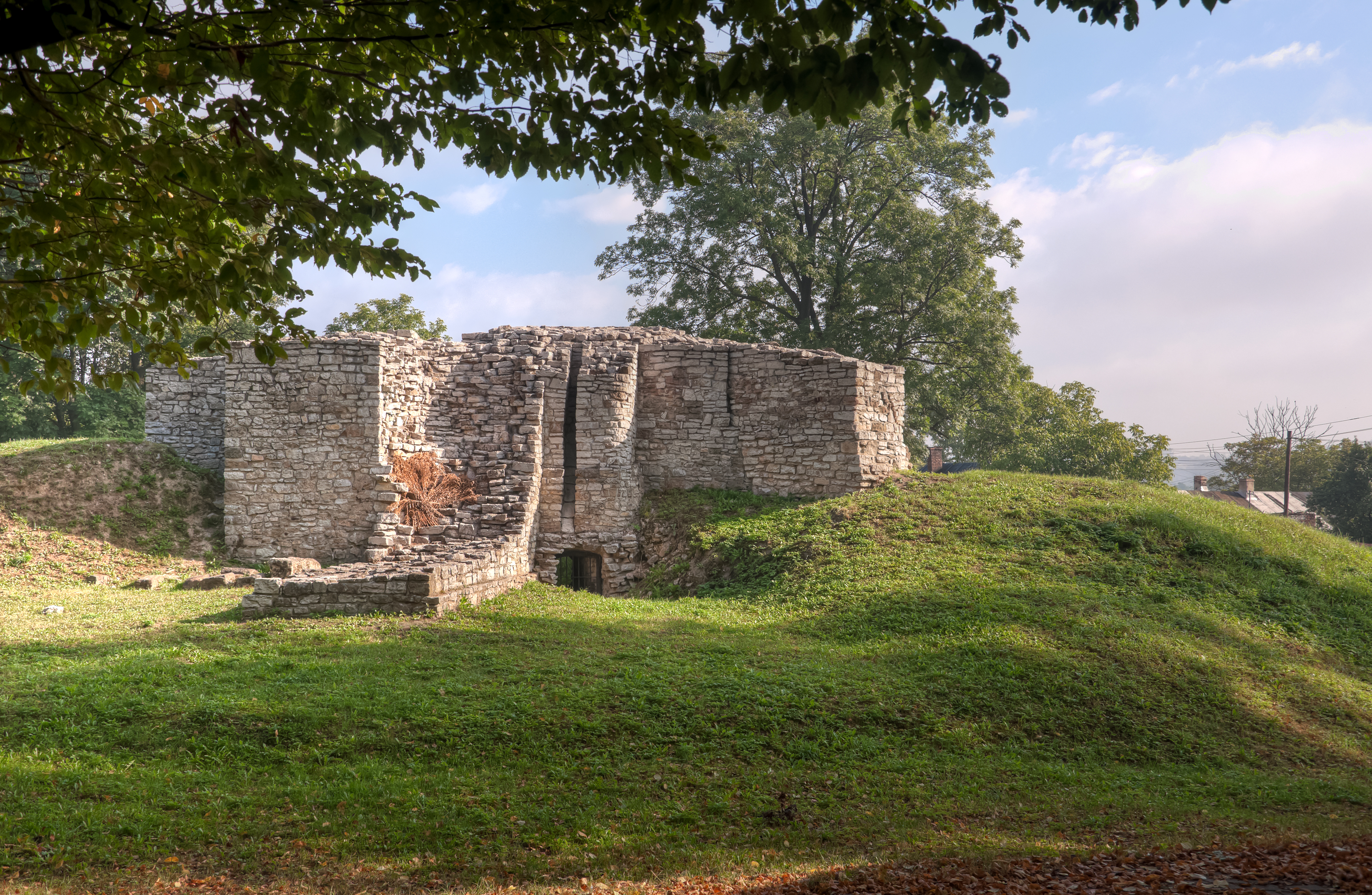 Relikty zamku średniowiecznego w Sławkowie